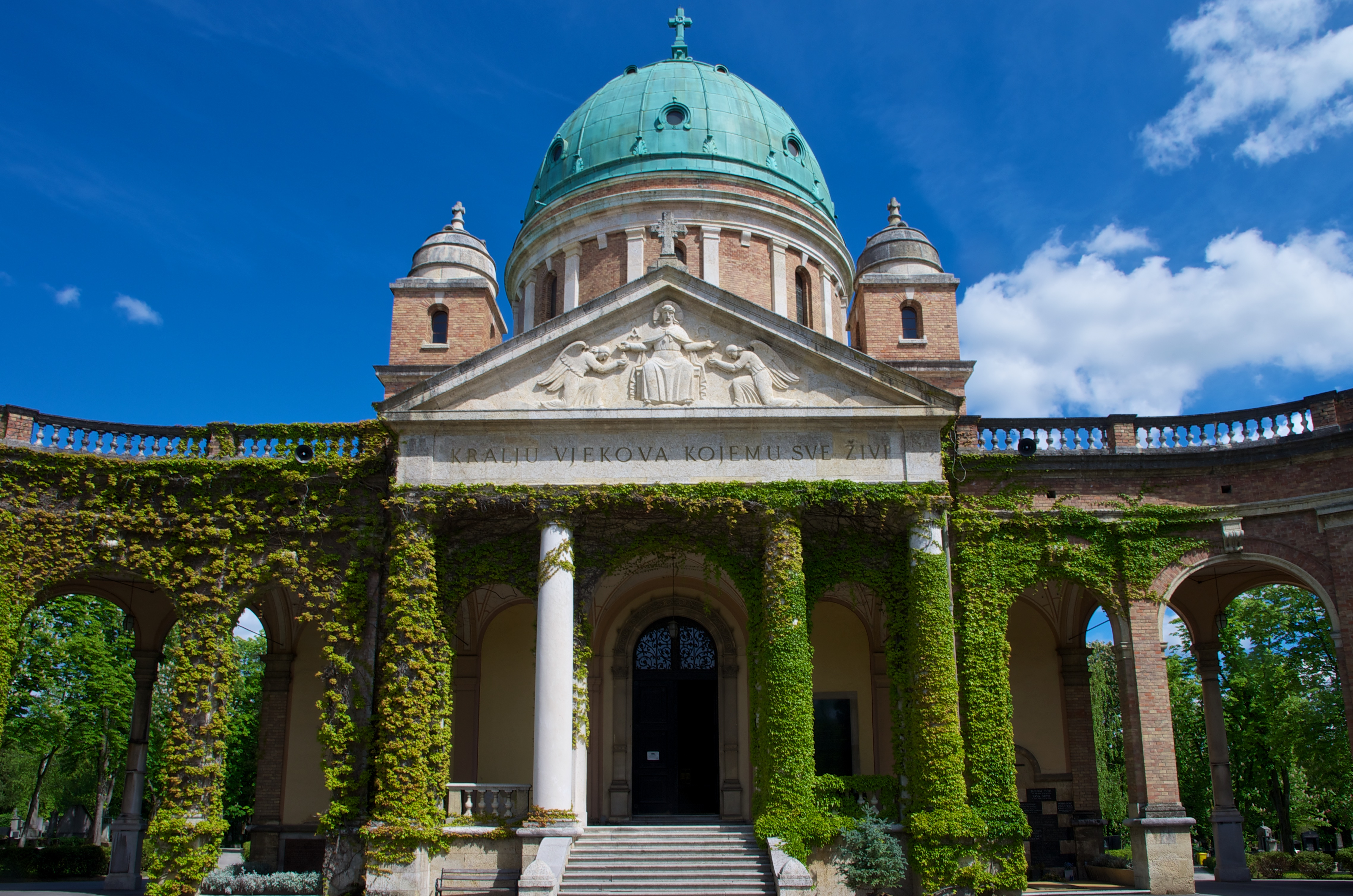 Mirogoj